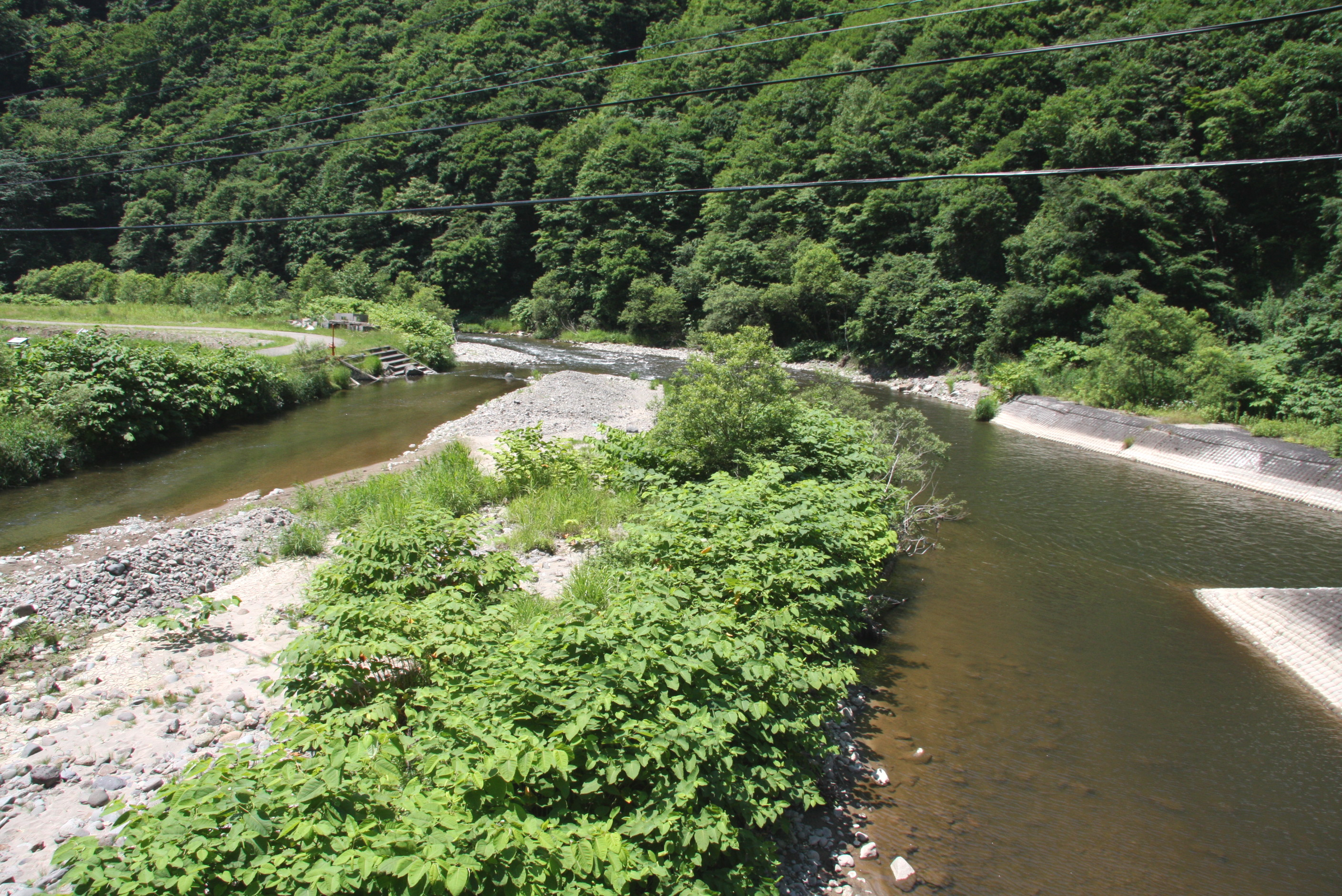 貫気別川 岩見橋より下流を望む